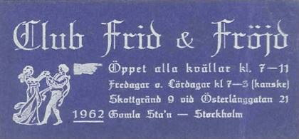 Club Frid & Fröjd Skottgränd 9 (dagens Källaren Stralsund)